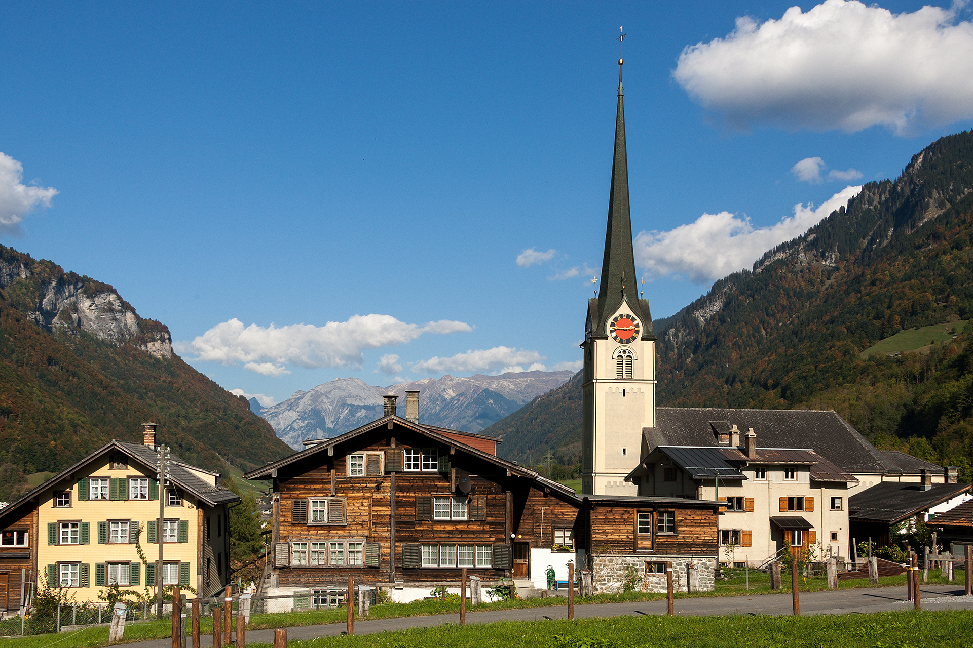 Linthal (GL)